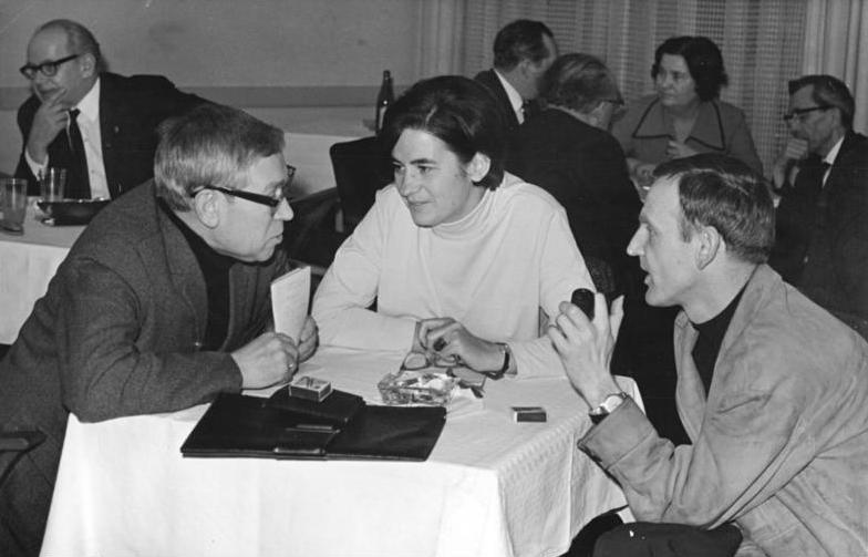 Zentralbild Demme 25.1.1967 - "Rahnsdorfer Gespräch" im Klub der Kulturschaffenden Berlin Karl Neumann, Christa Wolf und Günter de Bruyn (v.l.n.r.), nahmen am 24.1.1967 an dem "Rahnsdorfer Gespräch" im Klub der Kulturschaffenden Berlin teil. Wirtschaftsfunktionäre und Autoren des Deutschen Schriftstellerverbandes, diskutierten an diesem Abend über die Fernsehspiele "Hannes Trostberg" (von Bernhard Seeger), "Meine besten Freunde" (von Benito Wogatzki) und das Schauspiel "Katzengold" (von Horst Salomon).